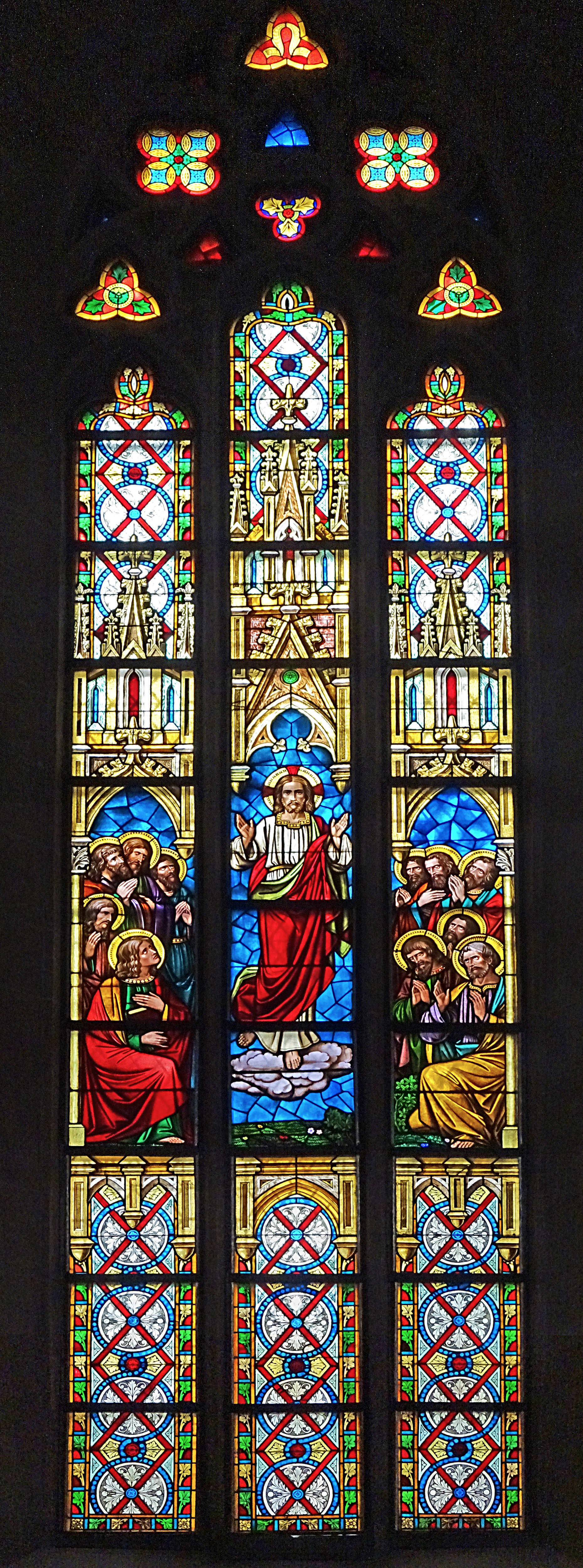 Buntglasfenster in der Pfarrkirche St. Nikolai (Quedlinburg)